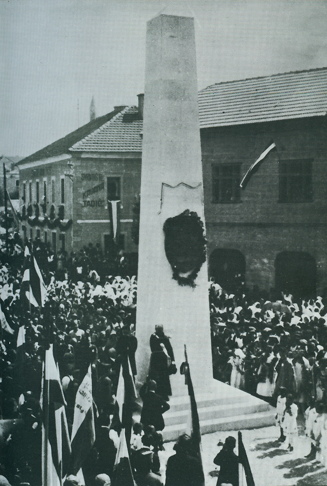 Svečanost otkrivenja spomenika kraju Tomsislavu u Livnu 5. rujna 1926. godine.